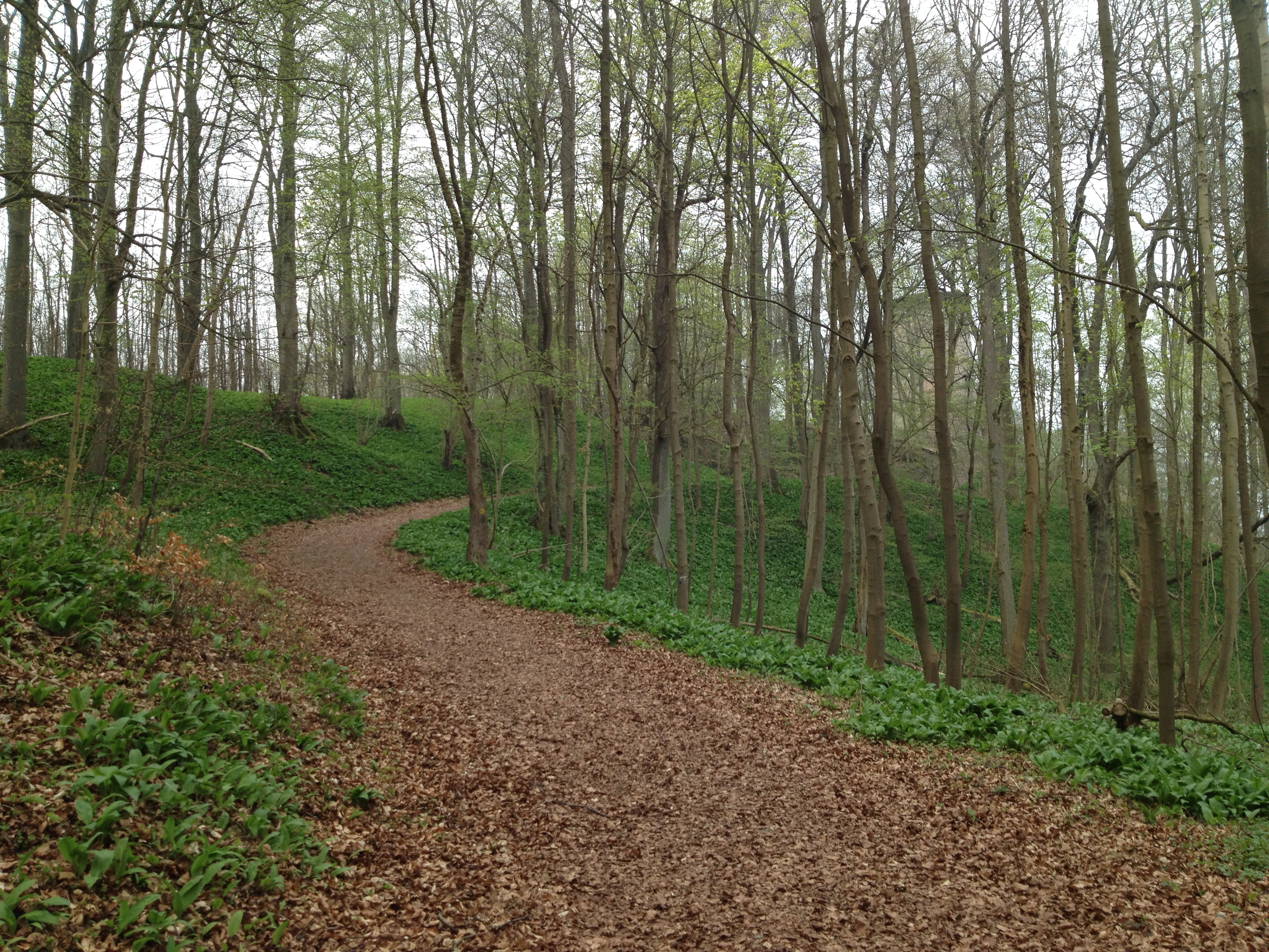 Auf dem Grimmsteig hinauf zur Burgruine Reichenbach